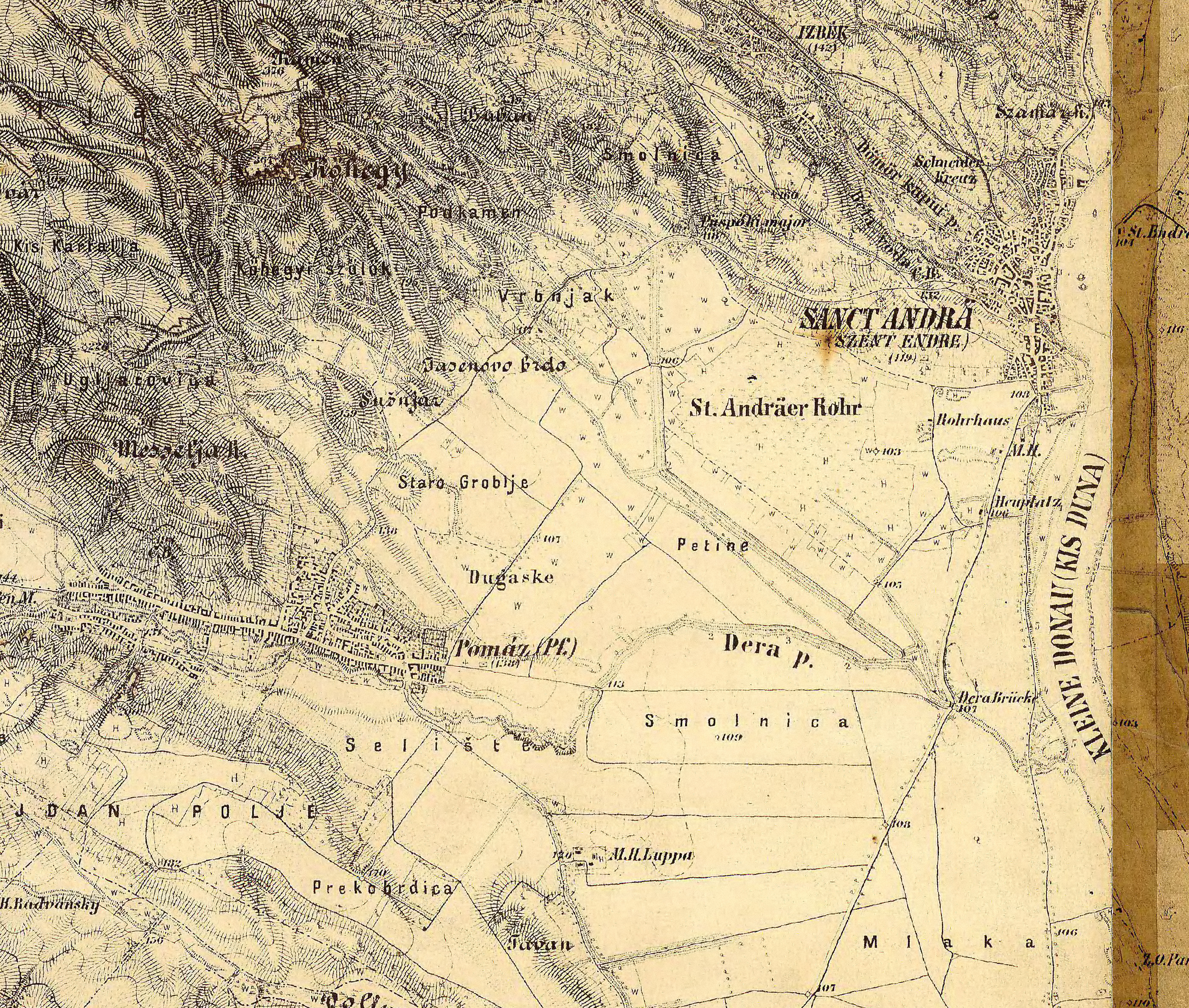 Térképrészlet a 3. katonai felmérésből